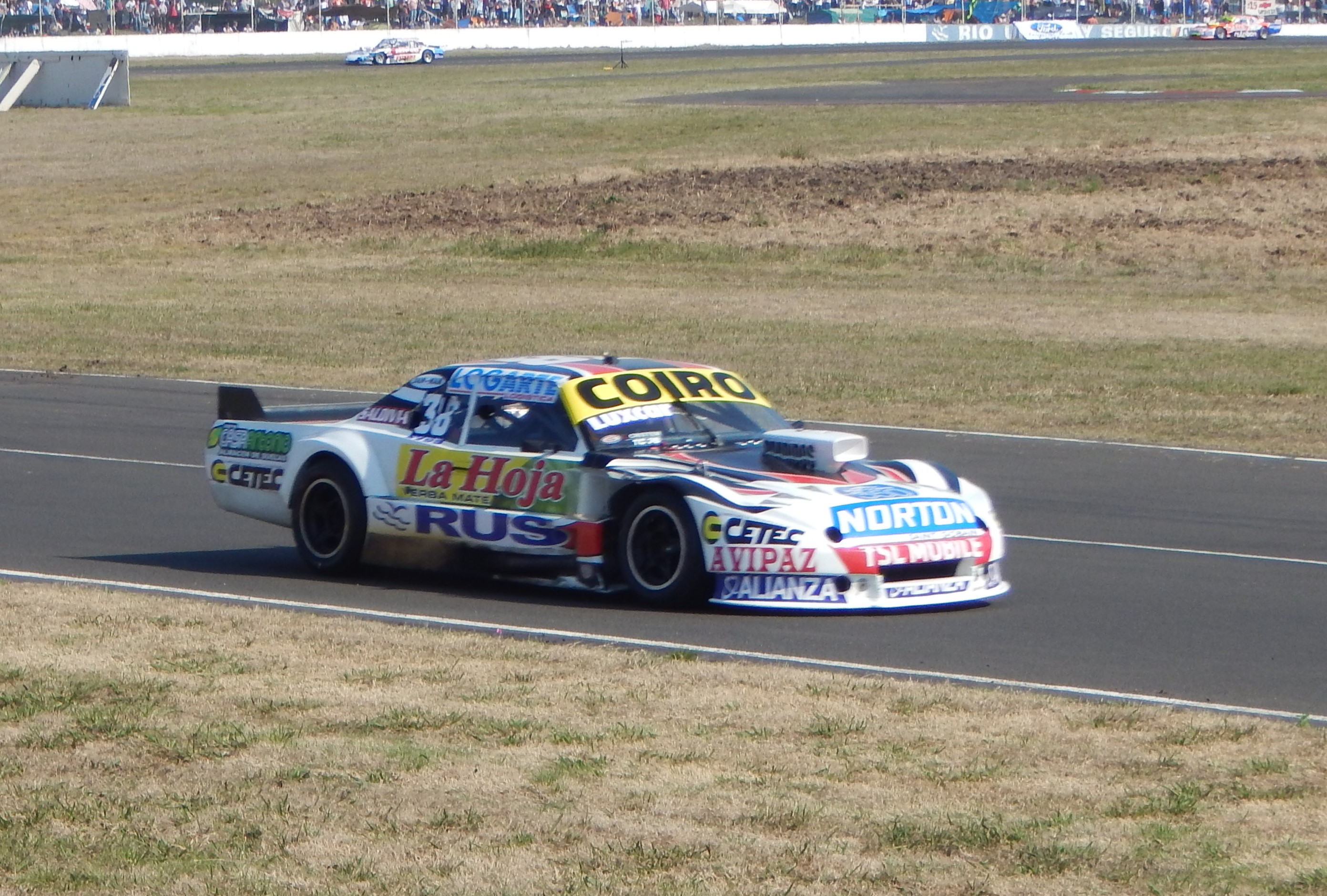 Martín Horacio Serrano TC Paraná 2015